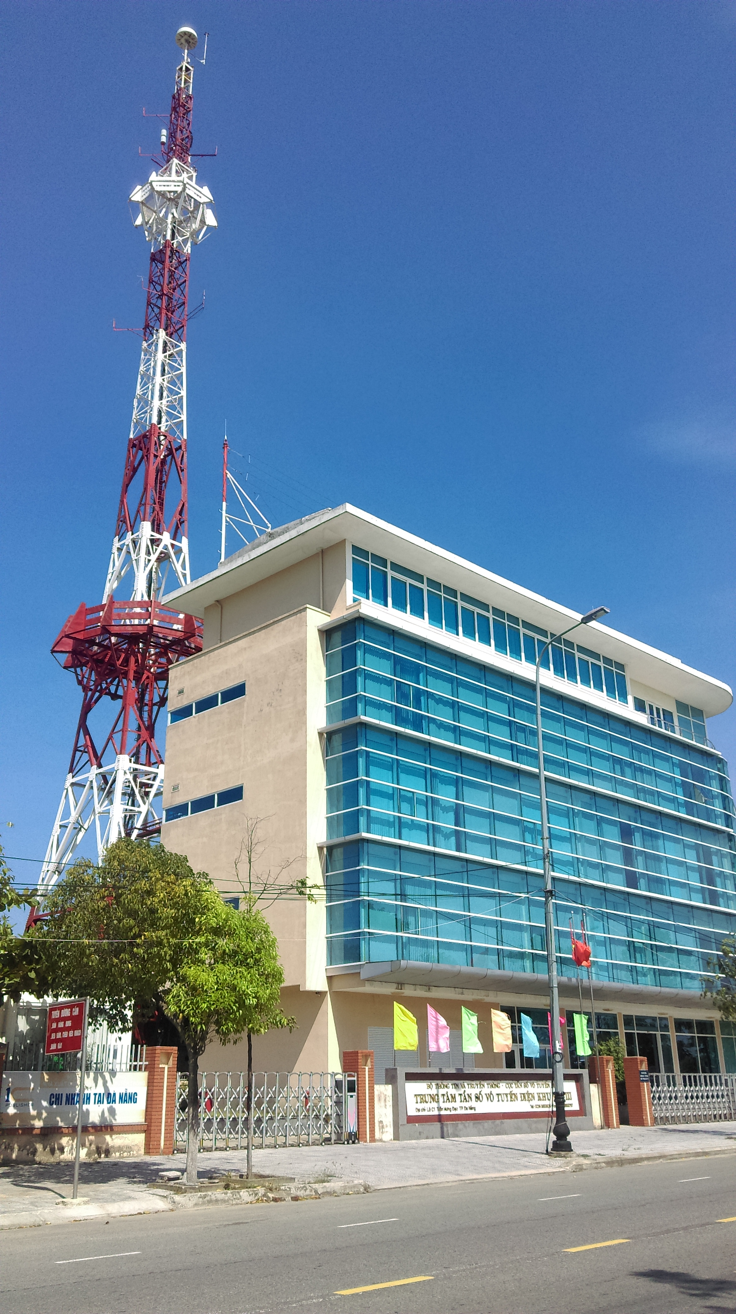 Trung tâm Tần số Vô tuyến điện khu vực III, Đà Nẵng